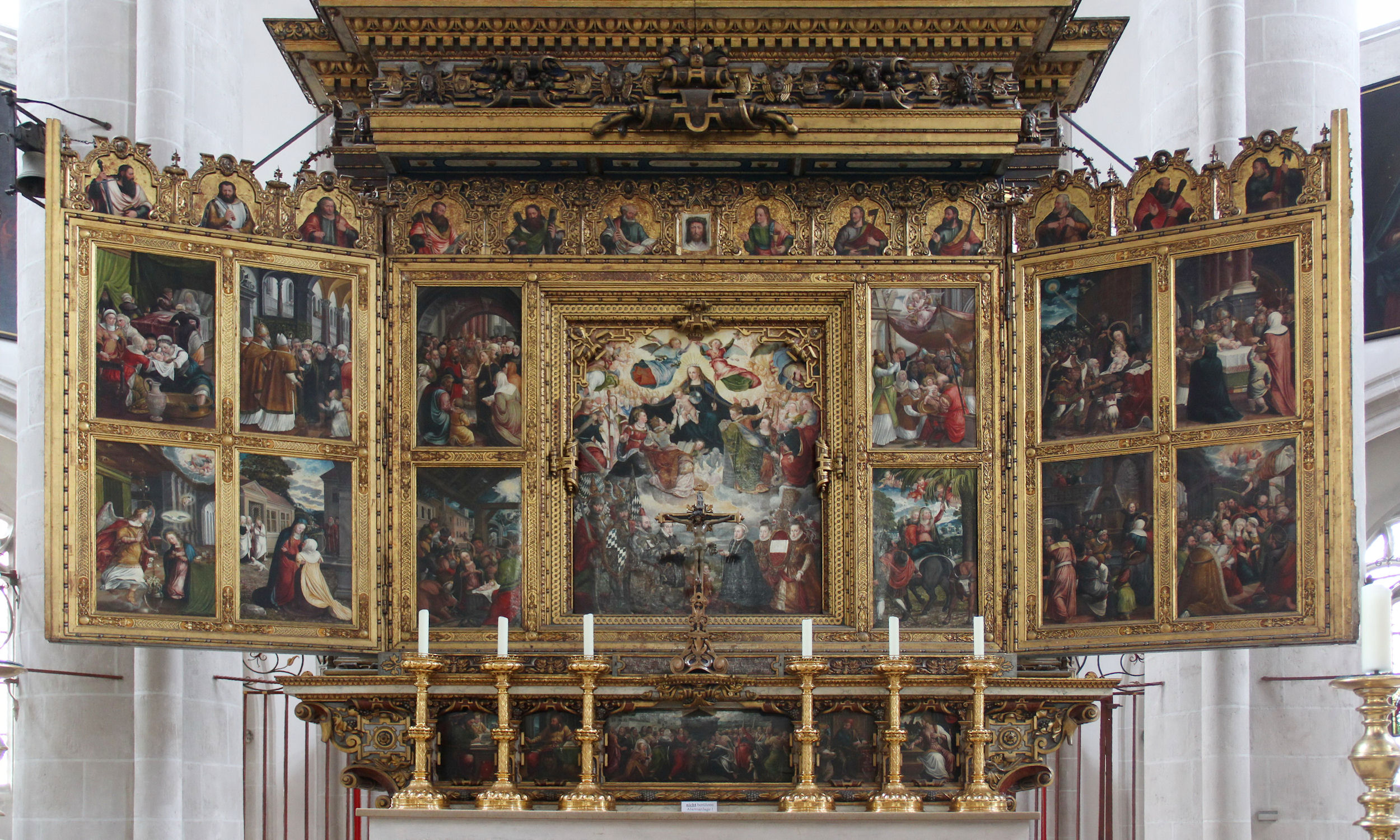 The main altar Minster of Our Lady Native nameMünster Zur Schönen Unserer Lieben FrauLocationIngolstadt, Upper Bavaria, GermanyCoordinates48° 45′ 51.3″ N, 11° 25′ 13.81″ E